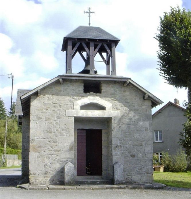 Savenne église 787154